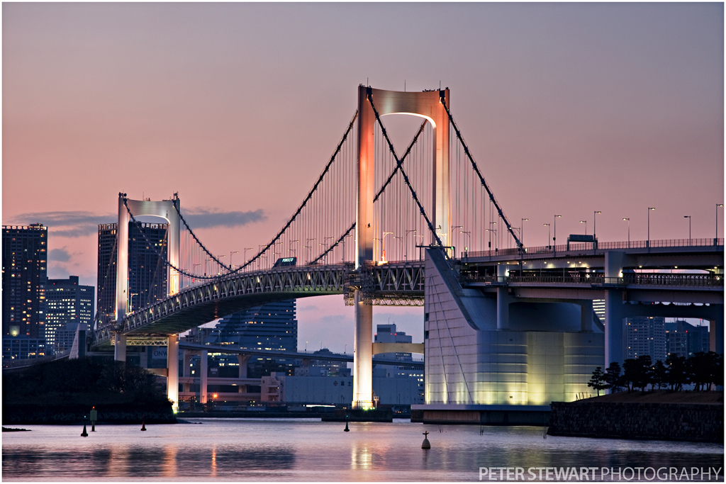 Odaibaお台場 Tokyo Bay 2